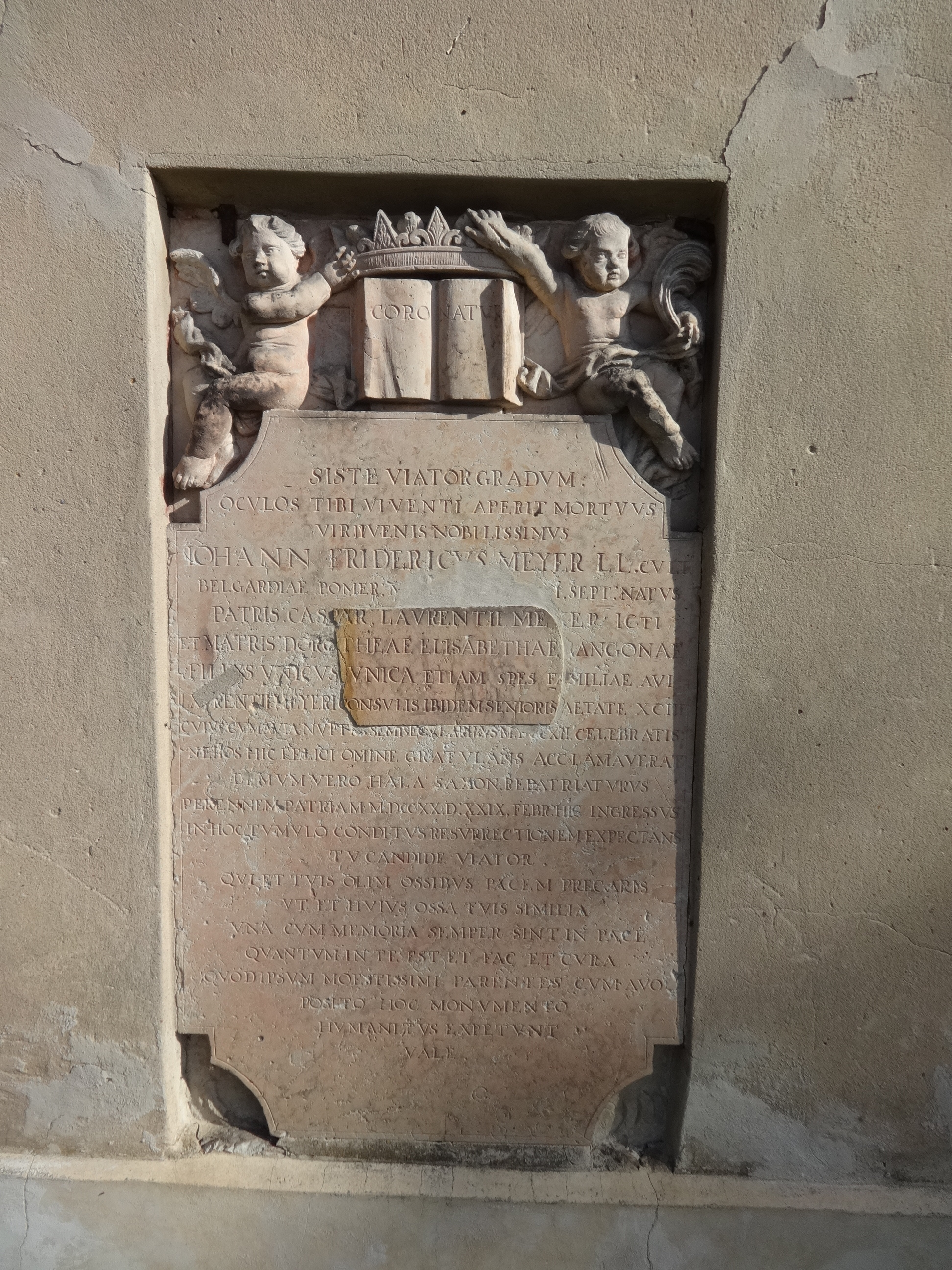 Die Saalkirche entstand im 18. Jahrhundert und wurde 1882 um einen Chor erweitert. Im Innern des flach gedeckten Sakralbaus steht eine Kanzel aus dem 18. Jahrhundert sowie eine Fünte aus dem Jahr 1794.